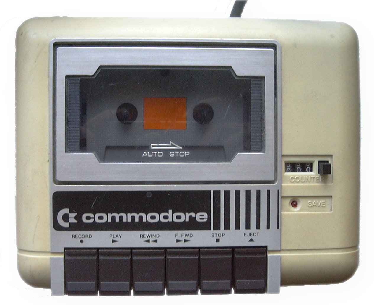 Commodore Datassette tape drive See also:Image:Datassette 1531.jpg